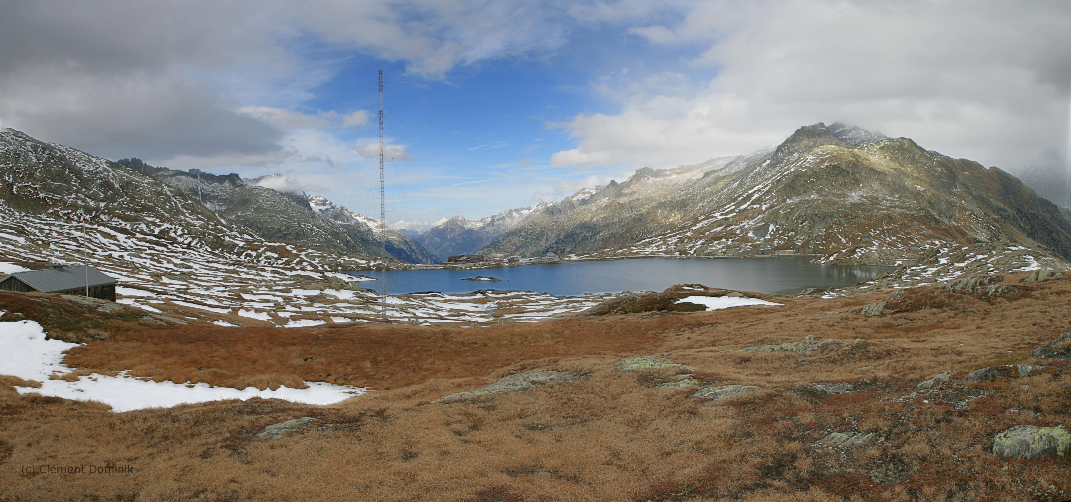 Grimselpass